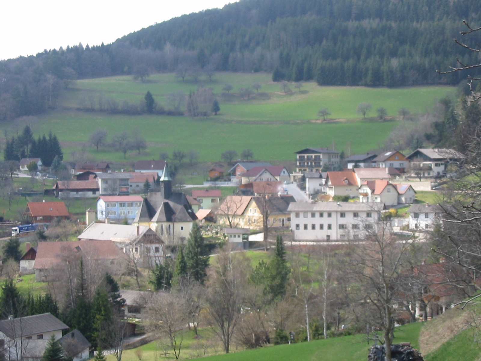 Ortszentrum von Prigglitz